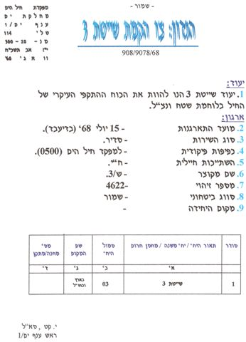 צו הקמה ליחידת שייטת ספינות הטילים